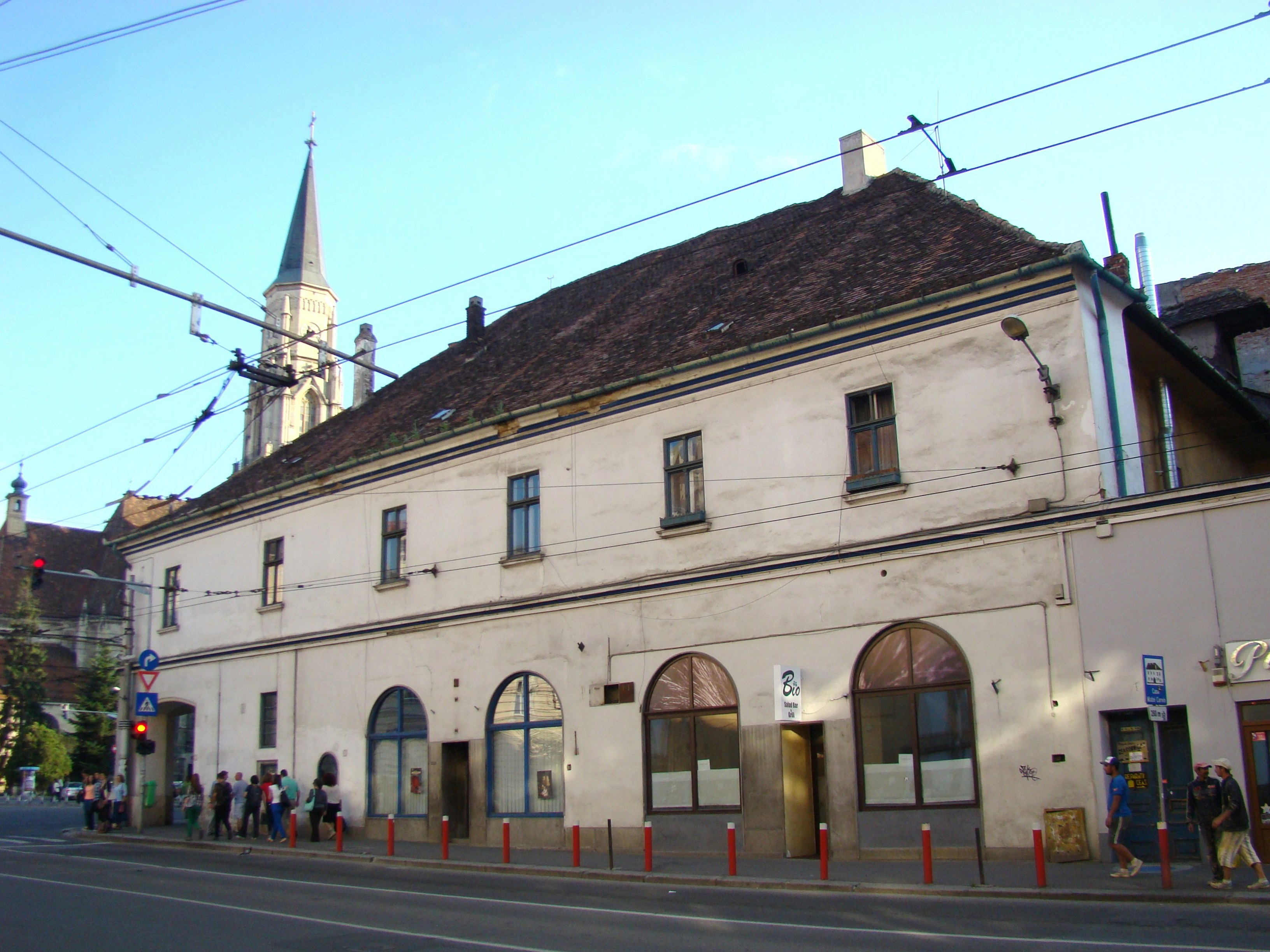 Muzeul Farmaciei